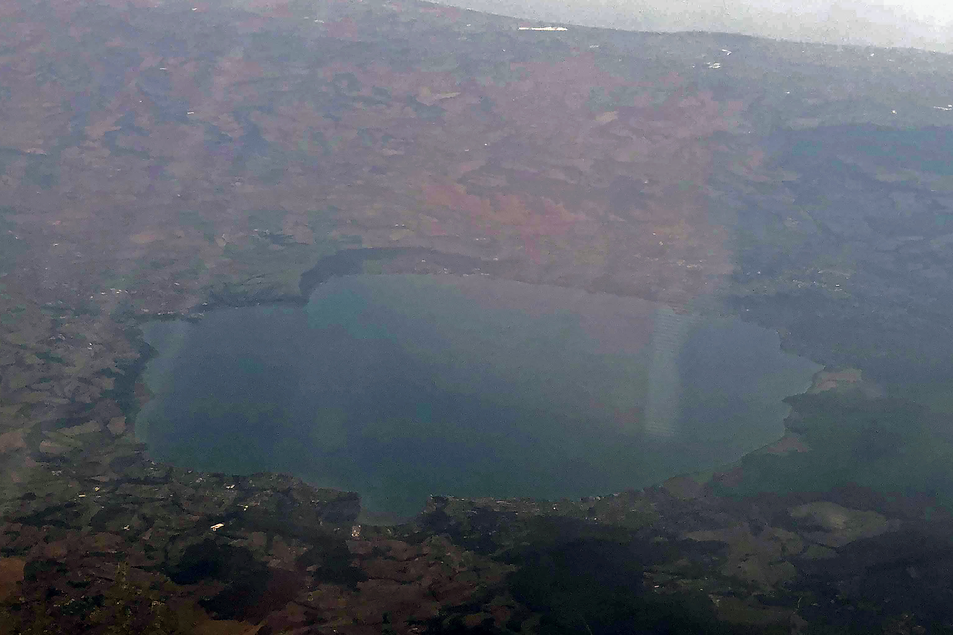 Vista aerea del Lago di Bracciano, agosto 2018